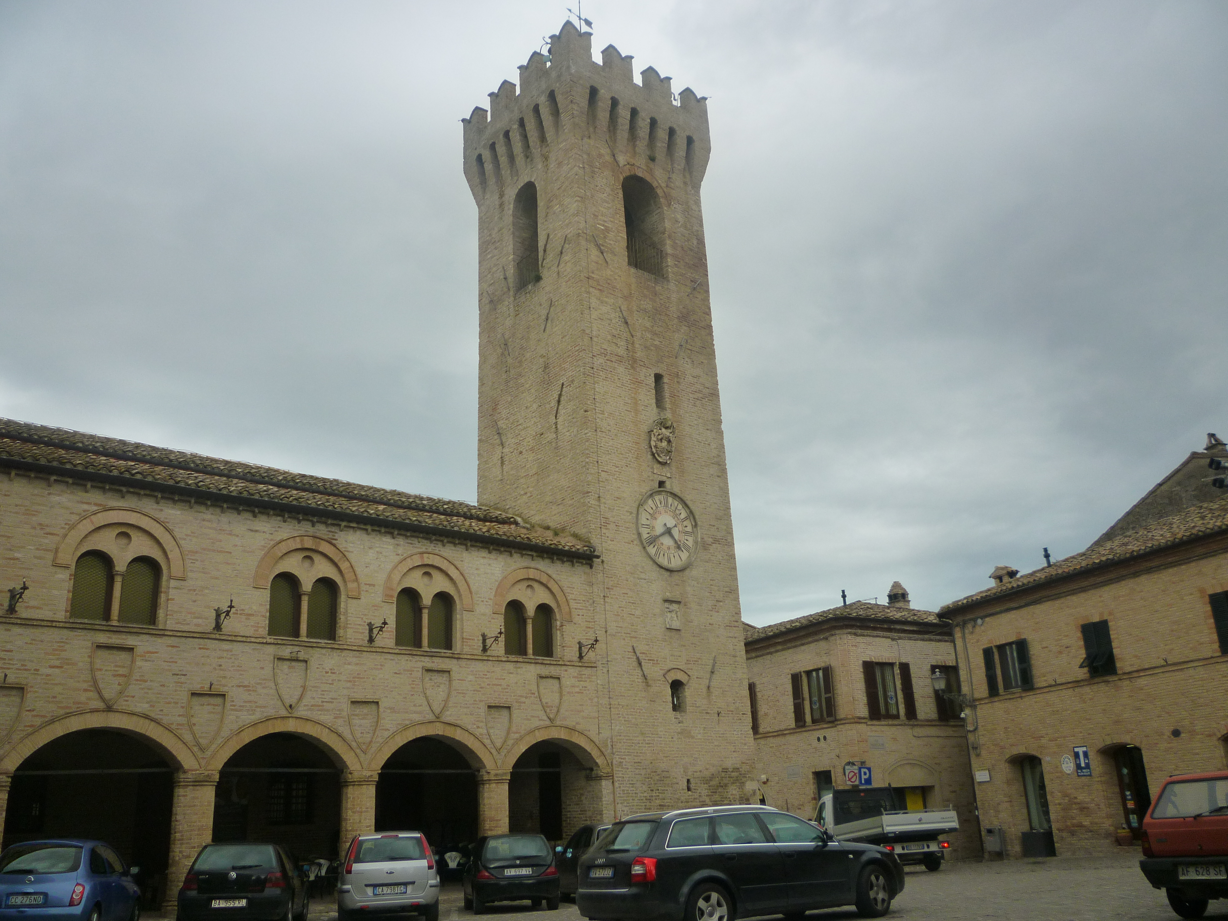 Palazzo dei priori